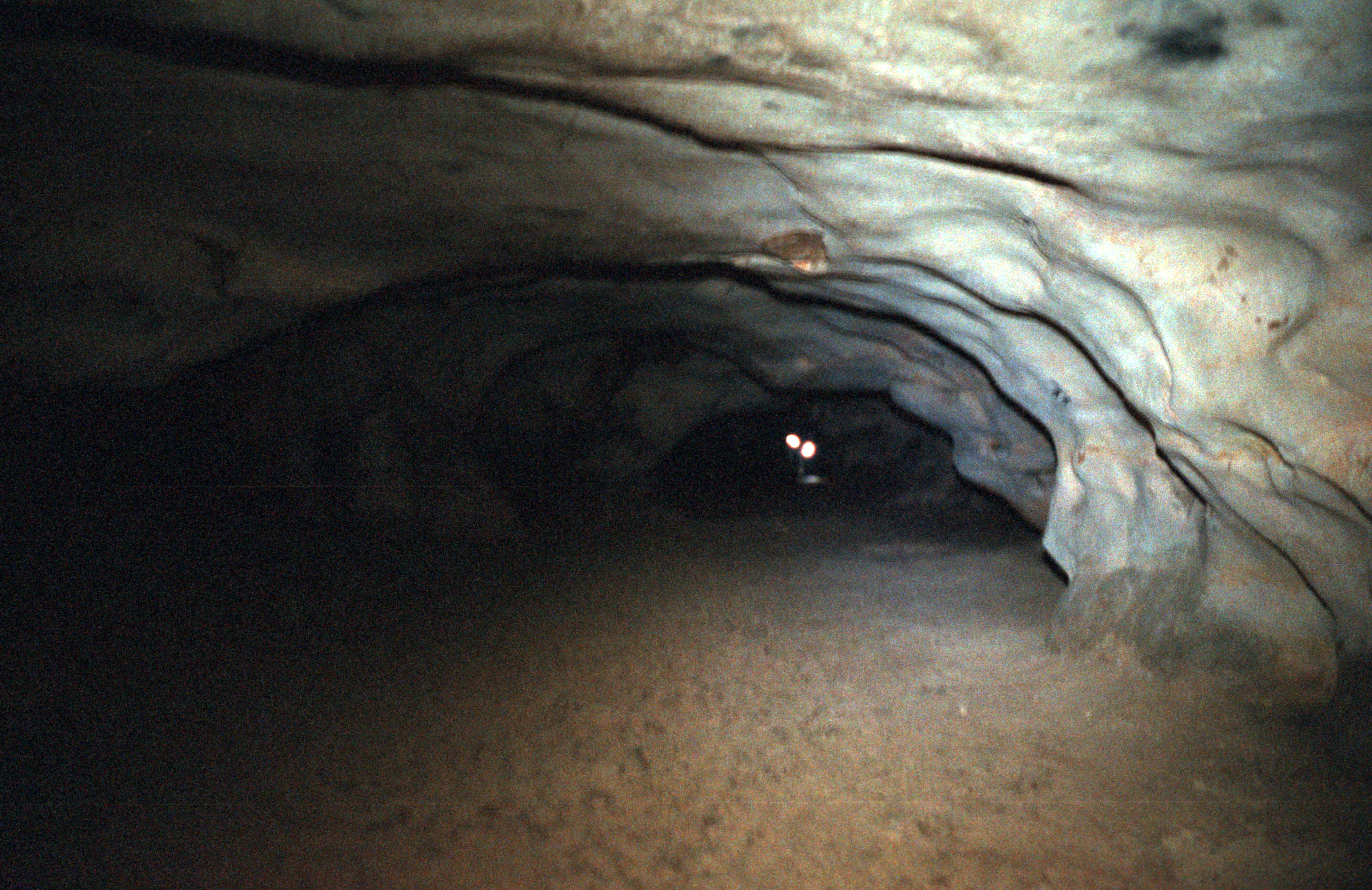 Cueva del Reguerillo